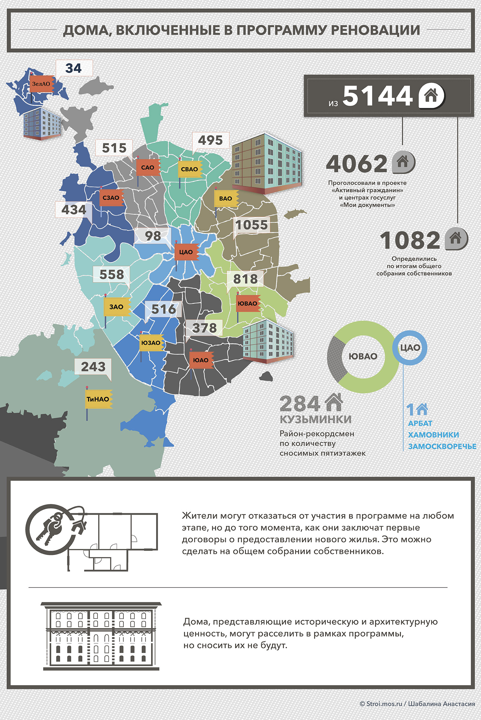 Дома, включенные в программу реновации